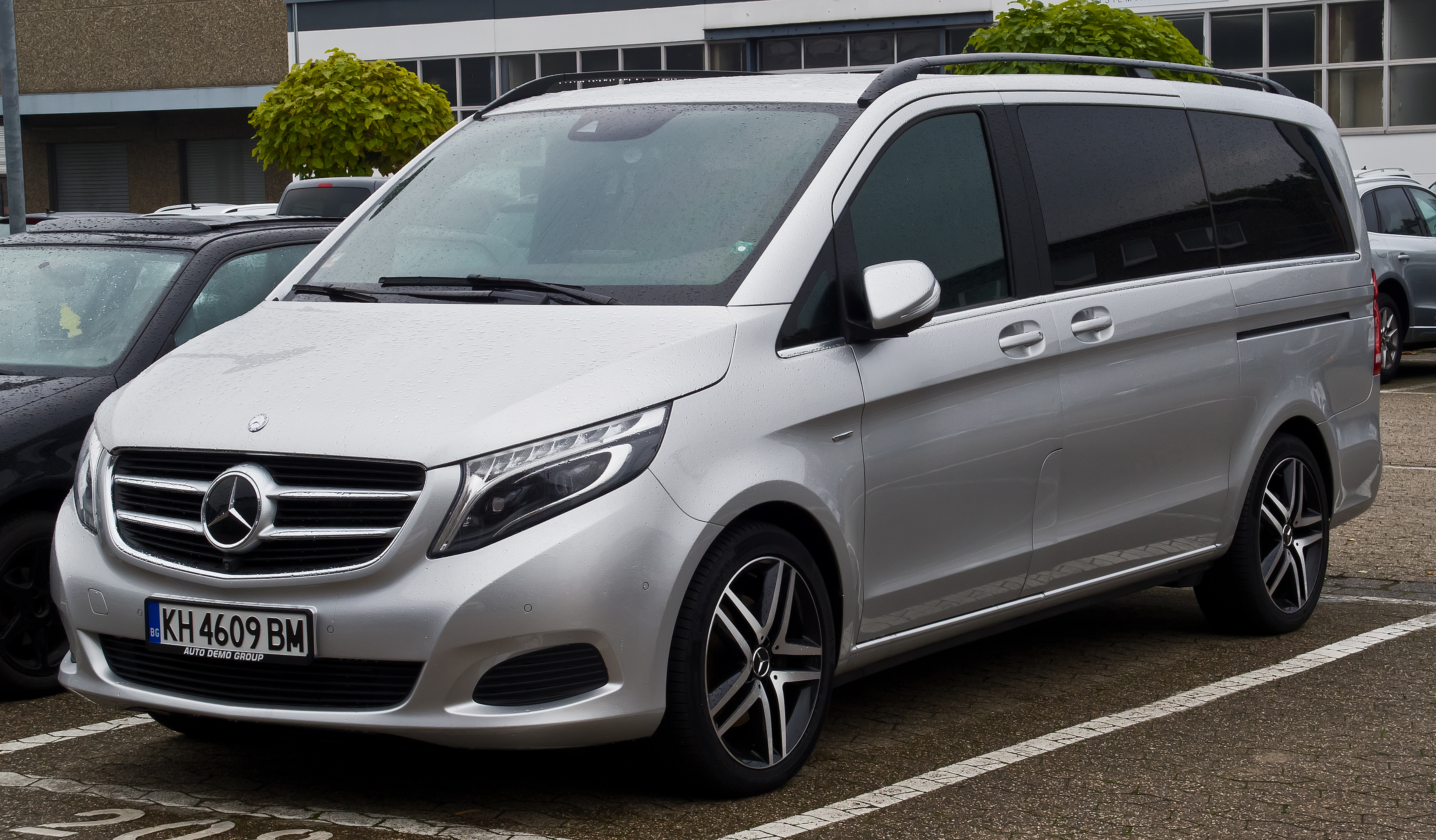 Mercedes-Benz V 250 BlueTEC Edition 1 Lang (V 447)